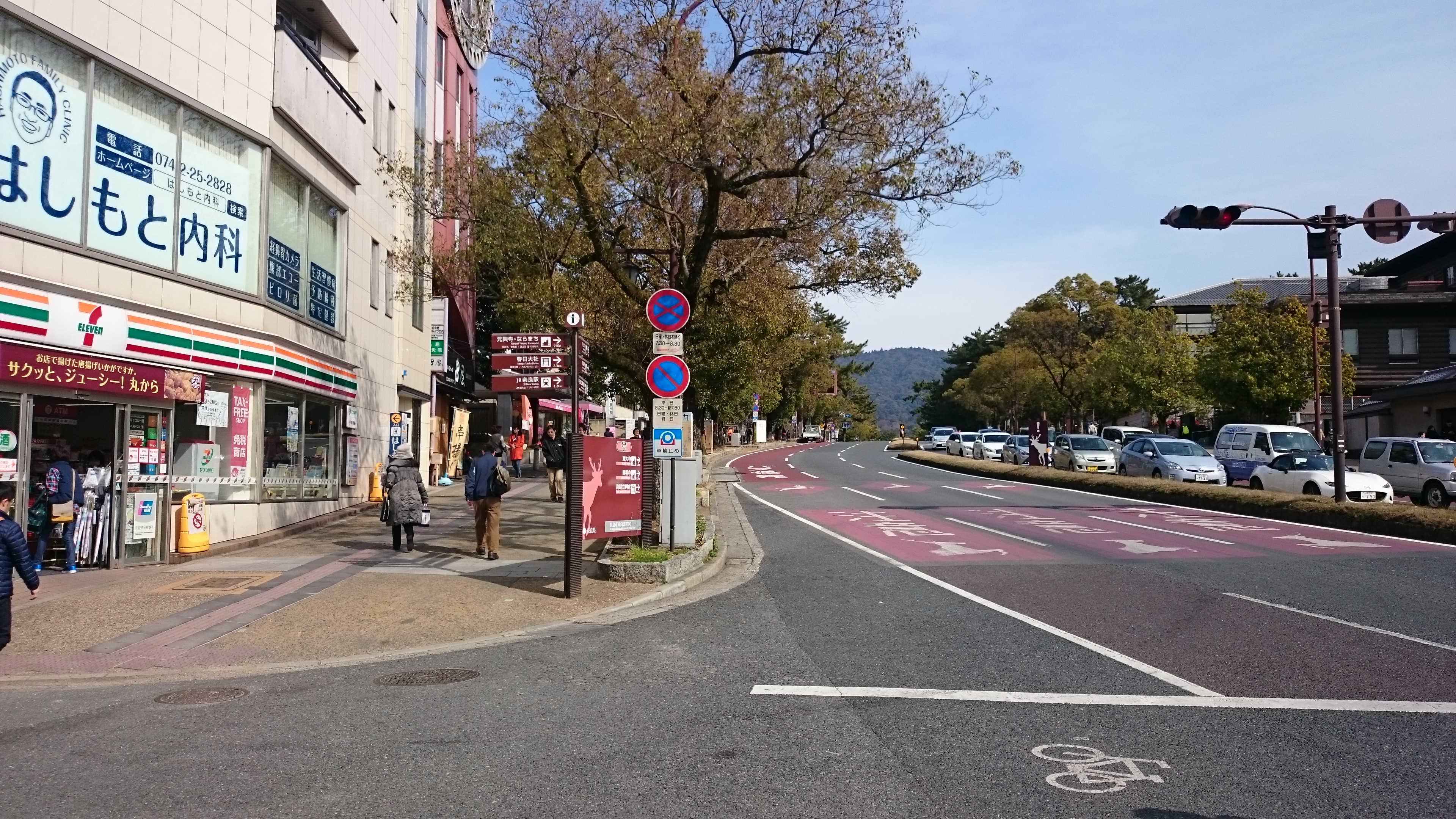 奈良県道266号 奈良自転車道の起点付近のです。 起点を示す標識は在りません。